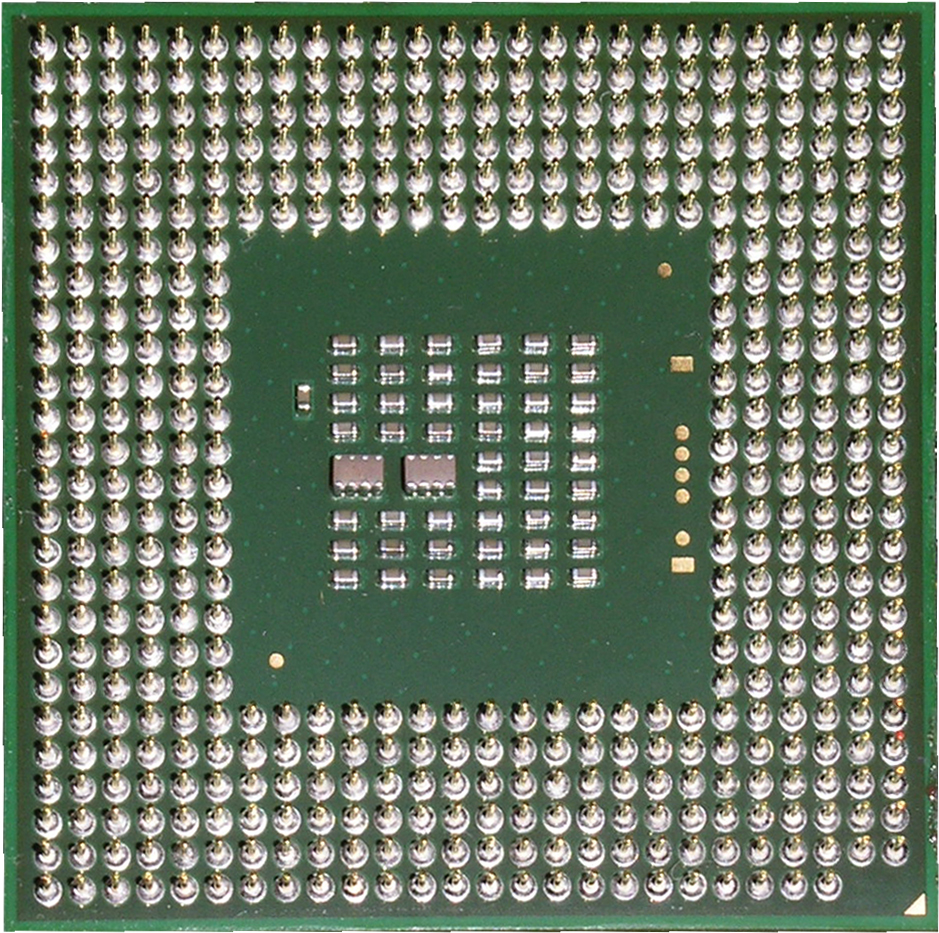 Procesor Intel Celeron D taktovaný na 2,53GHz.